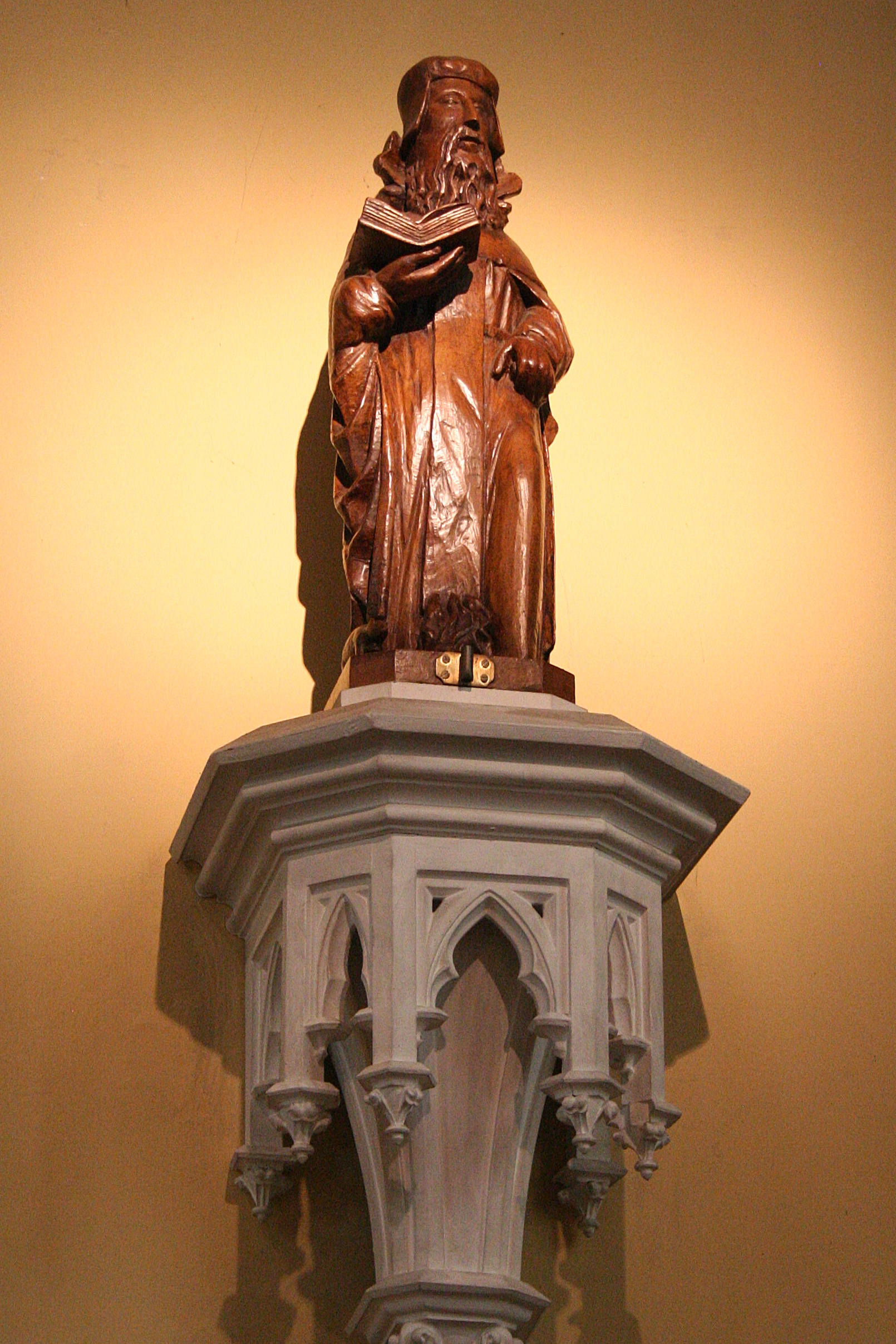 Wolfsdonk - Sint-Antonius Abt Kerk - Afbeelding van Sint-Antonius Abt